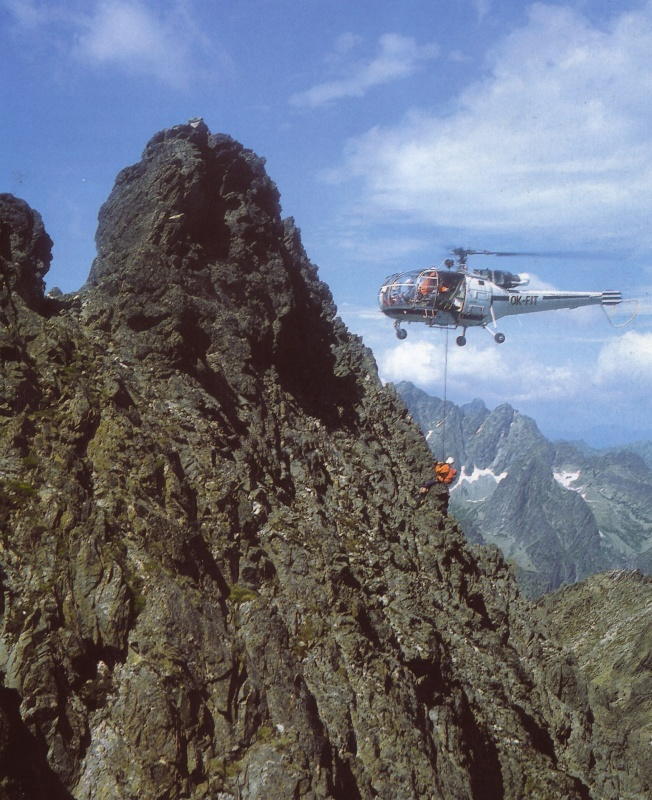 Záchranná akcia - HEMS - Slovakia